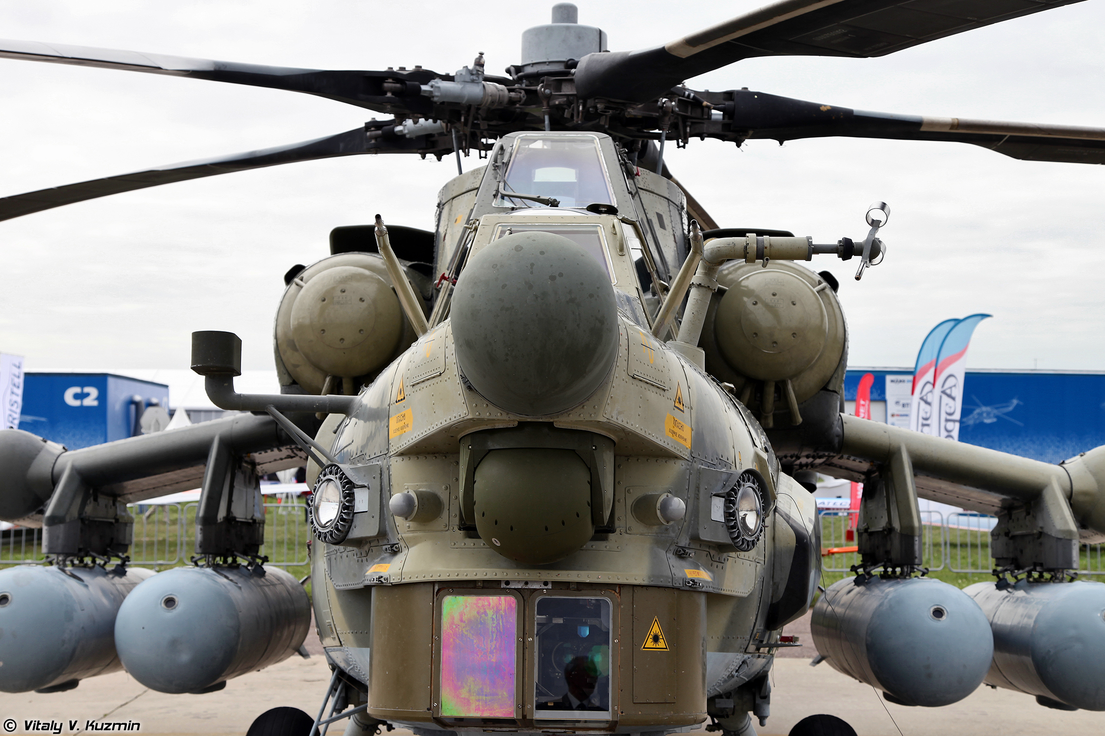 Ми-28Н (Mi-28N)